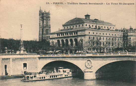 Théâtre de la Ville (ex Théâtre Sarah Bernhardt)